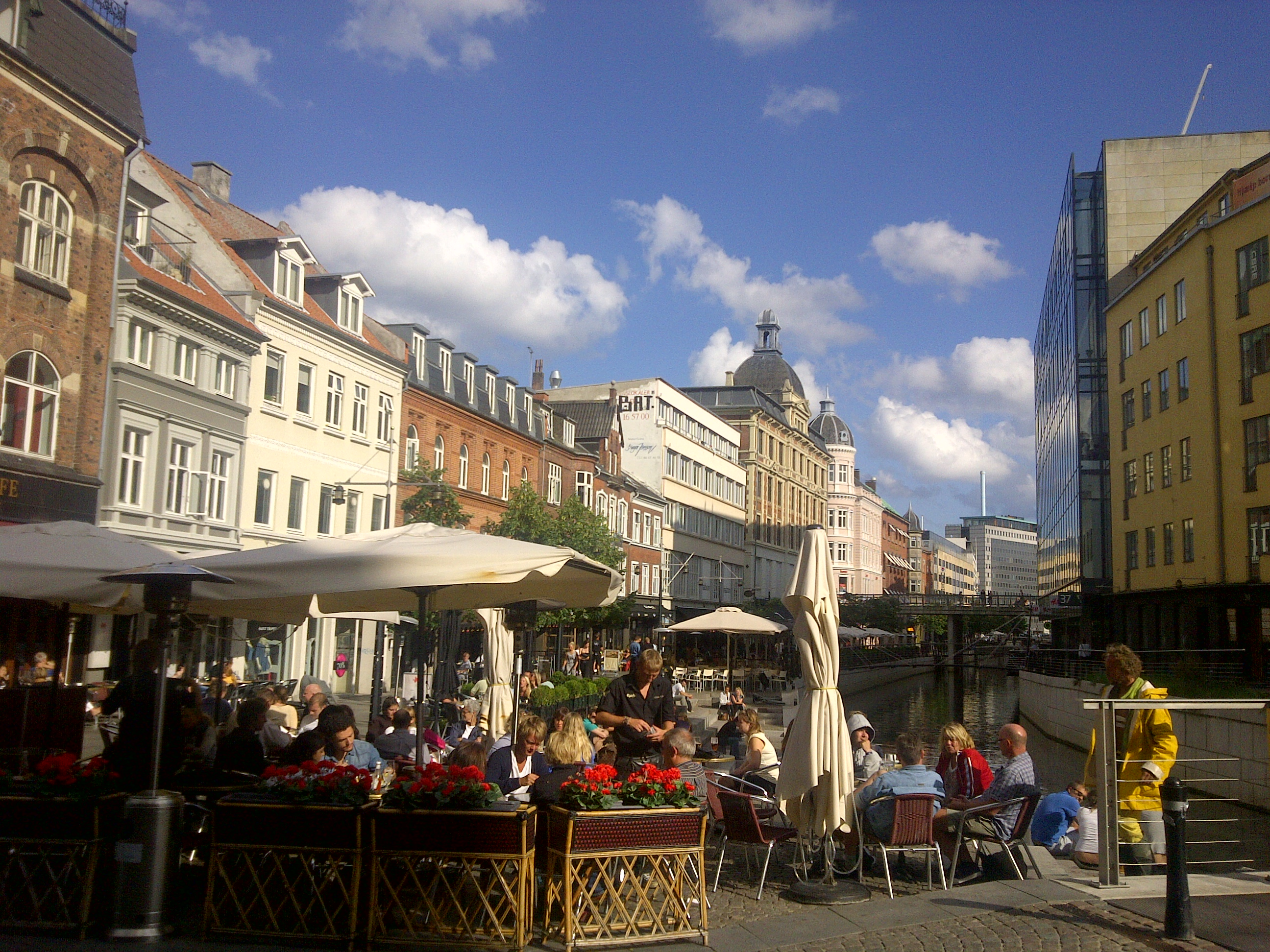 Café in Århus